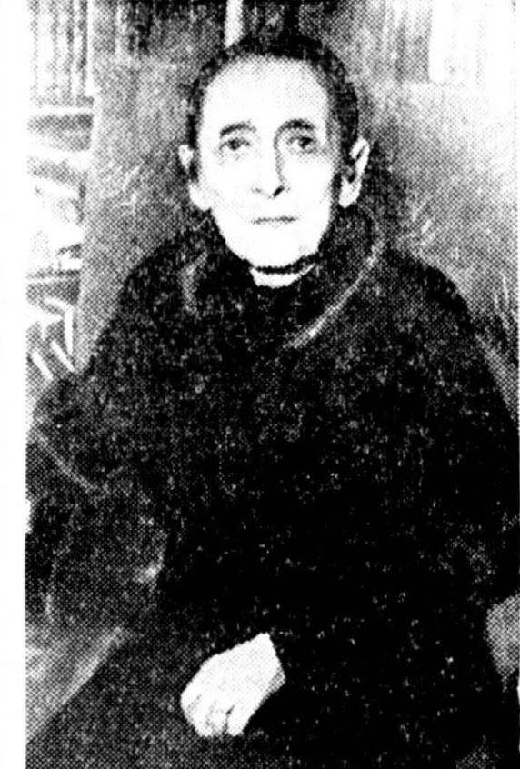 Ida Hellesen